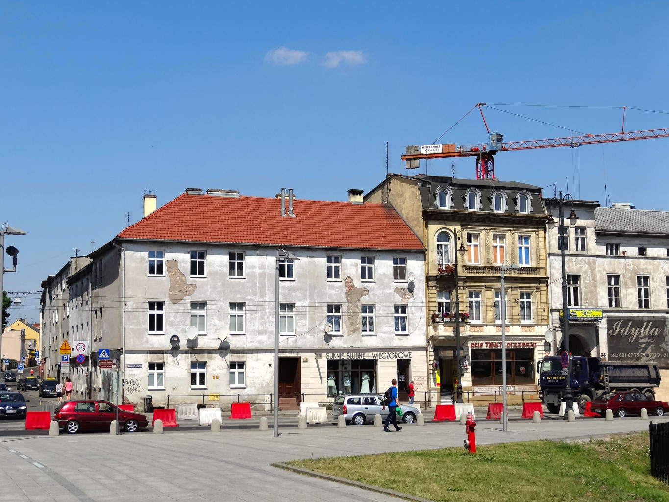 Ulica Ferdynanda Focha w Bydgoszczy